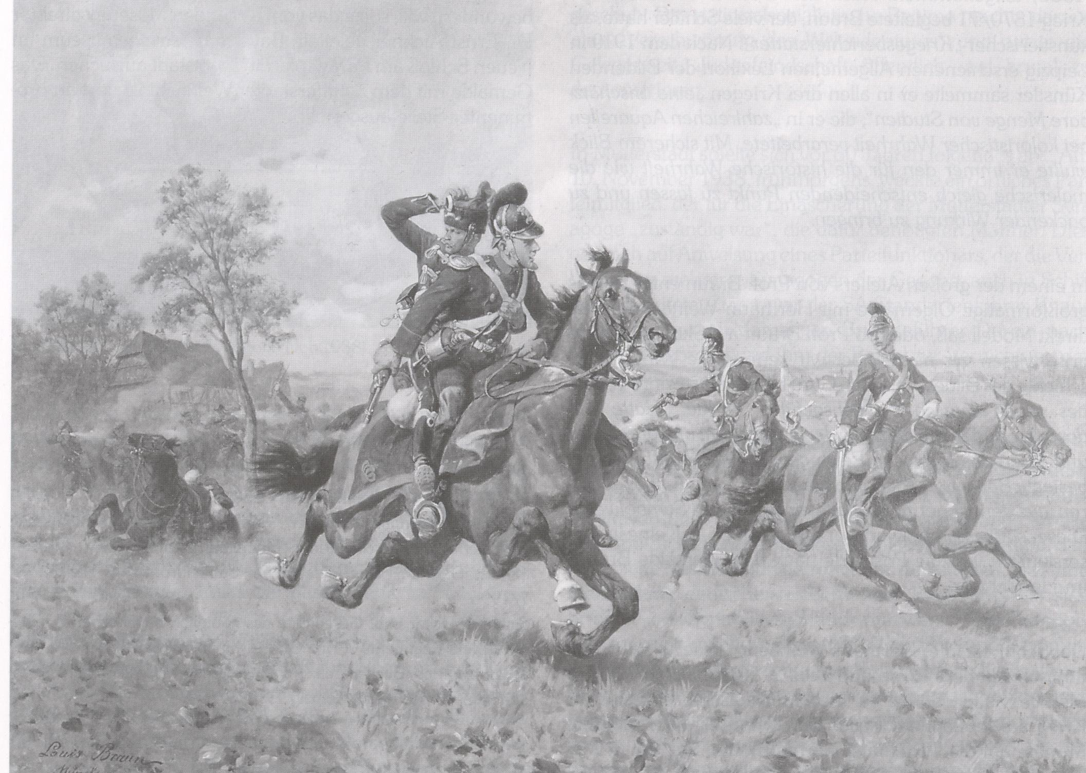 Gemälde „Gefecht bei Stürzelbronn“, 1. August 1870; Es stellt die Rettung eines preußischen Husaren durch den bayerischen Chevauleger Hermann Weinacht dar (Schwarz-Weiß Abbdruck). Das Original befindet sich im Neuen Schloss im Bayerischen Armeemuseum in Ingolstadt (Inv. Nr. B 6263).